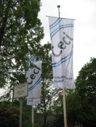 Fahne des Ceciliengymnasiums in Biefeld